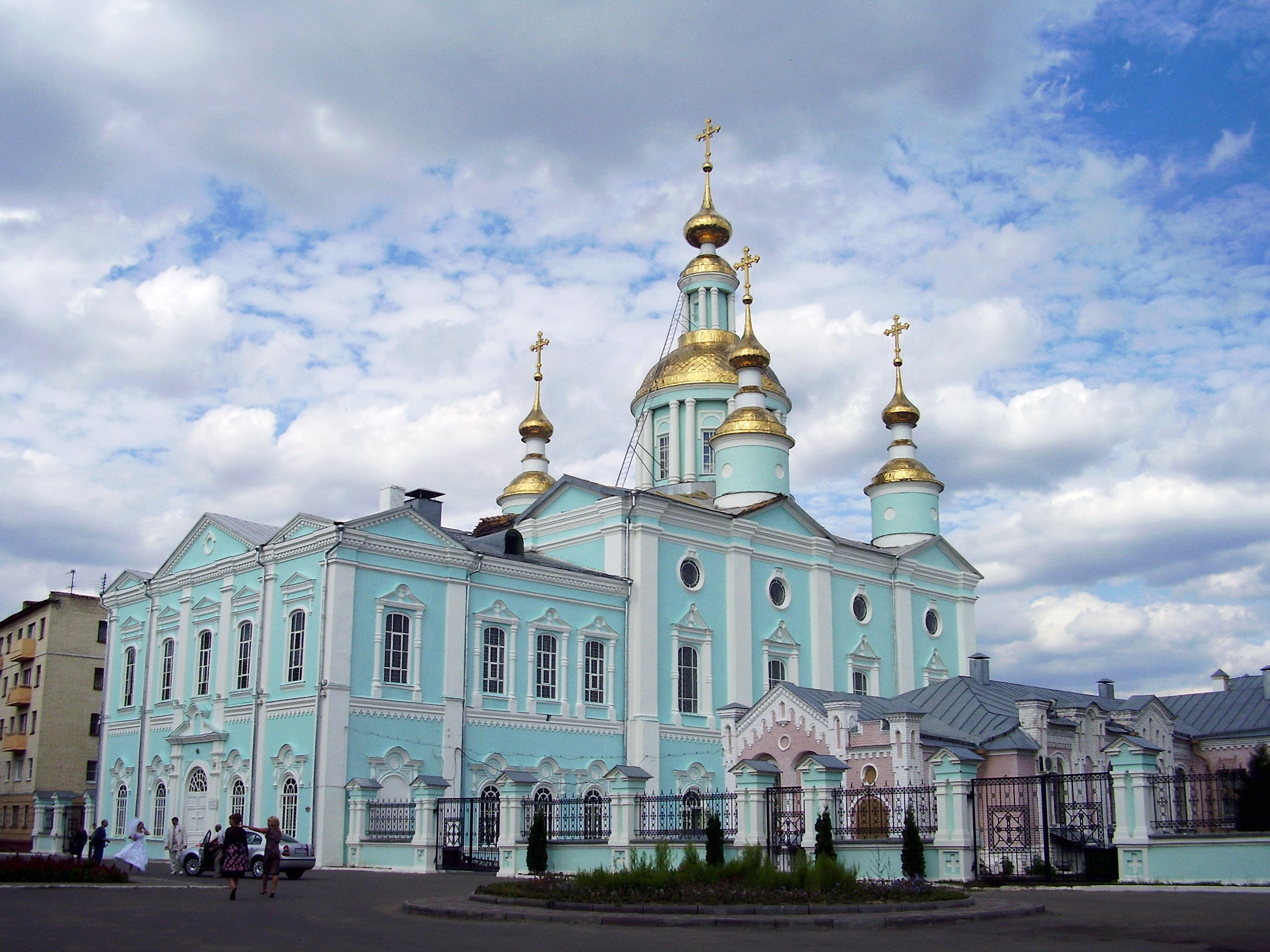 Тамбов.Спасо-Преображенский кафедральный собор